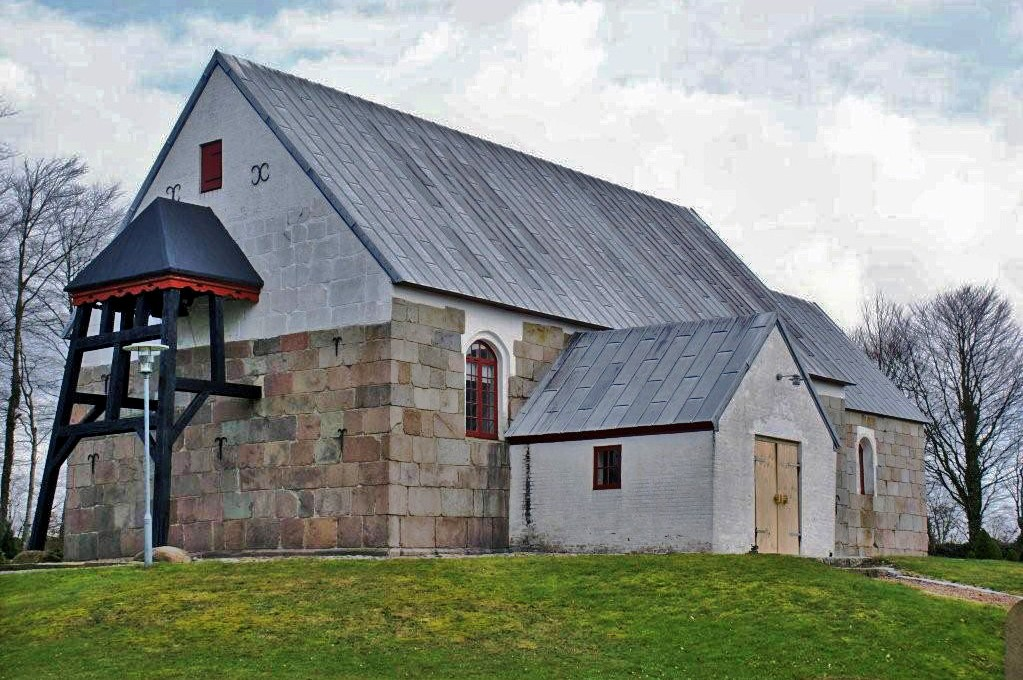 fra sydvest